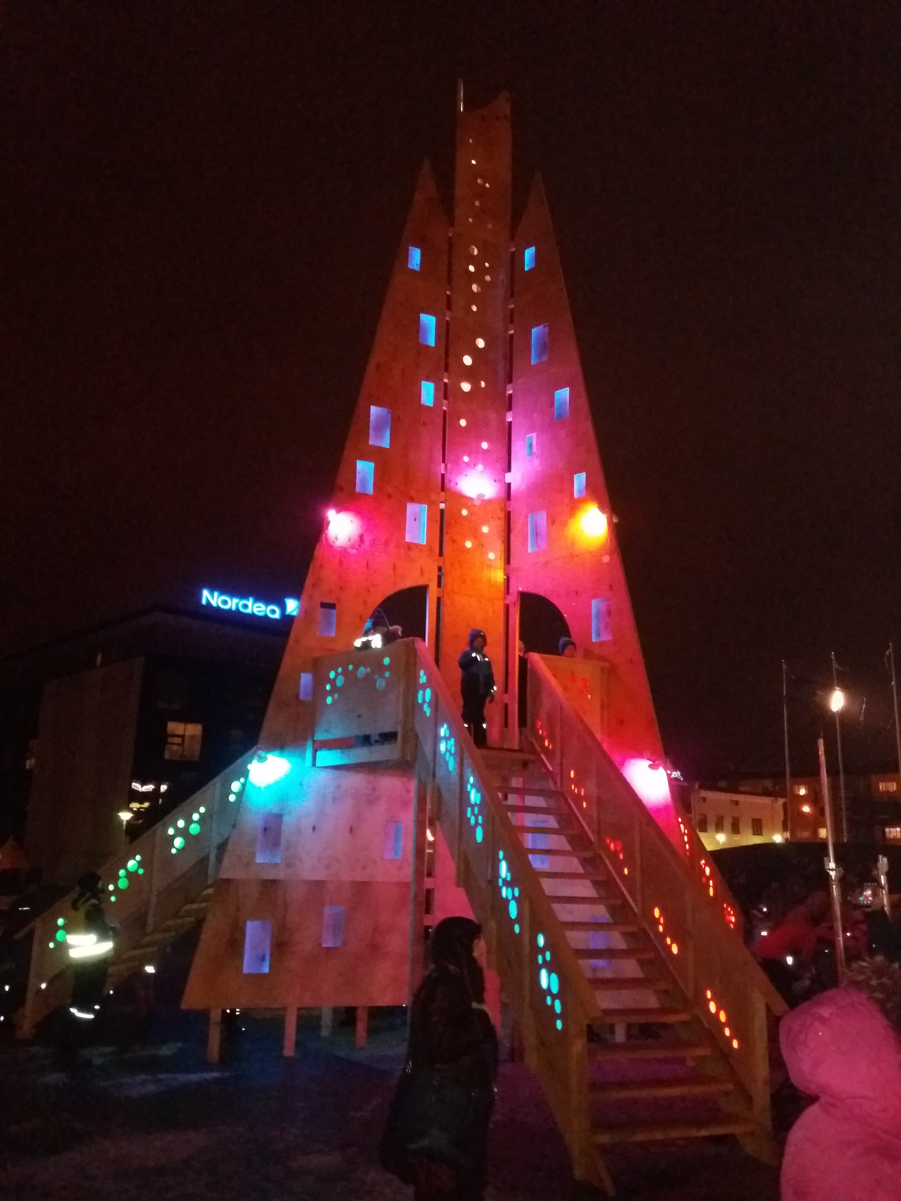 Rakvere jõulukuusk 2017